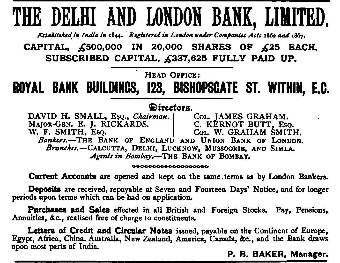 Advertisement for Delhi and London Bank